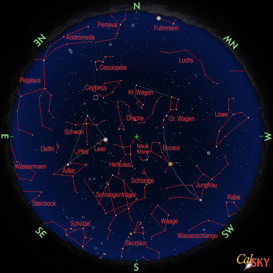 Sternhimmel im Sommer (50° Breite, Mitte Juli 22 Uhr) Berechnet mit Programm calSKY, siehe z. B. Geof 05:52, 23. Dez 2005 (CET)